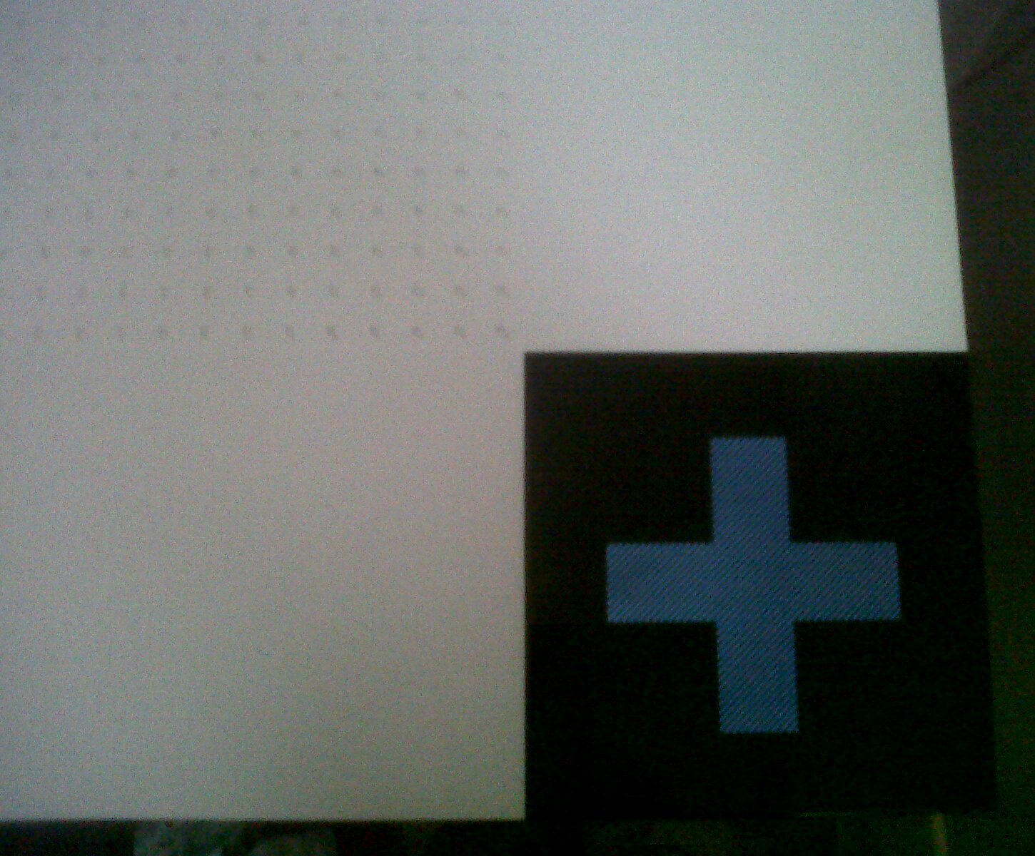 Décodeur Canalsat +Le Cube couché